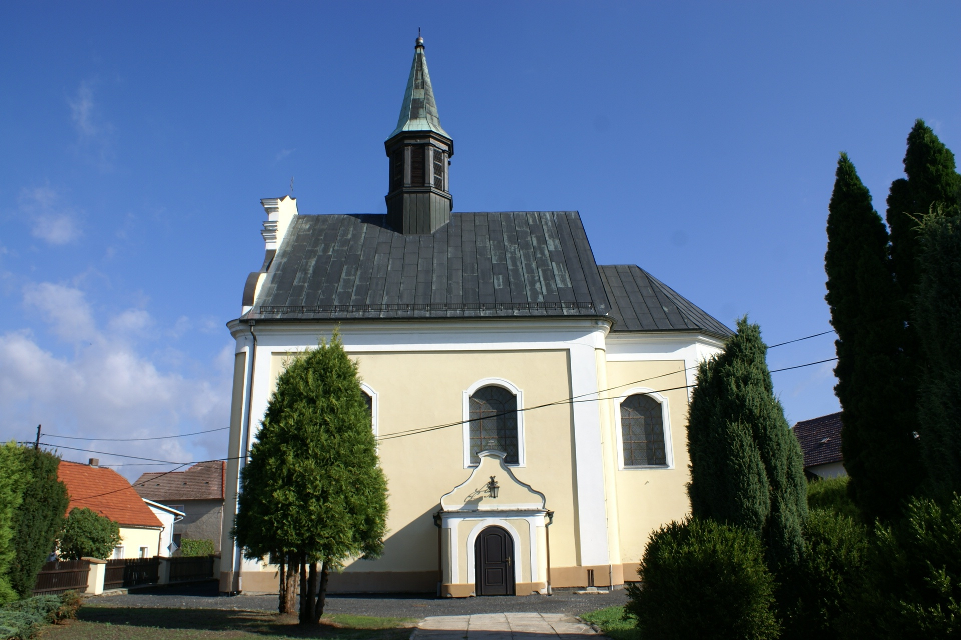 kościół par. p.w. św. Mikołaja, 1 poł. XVIII w.